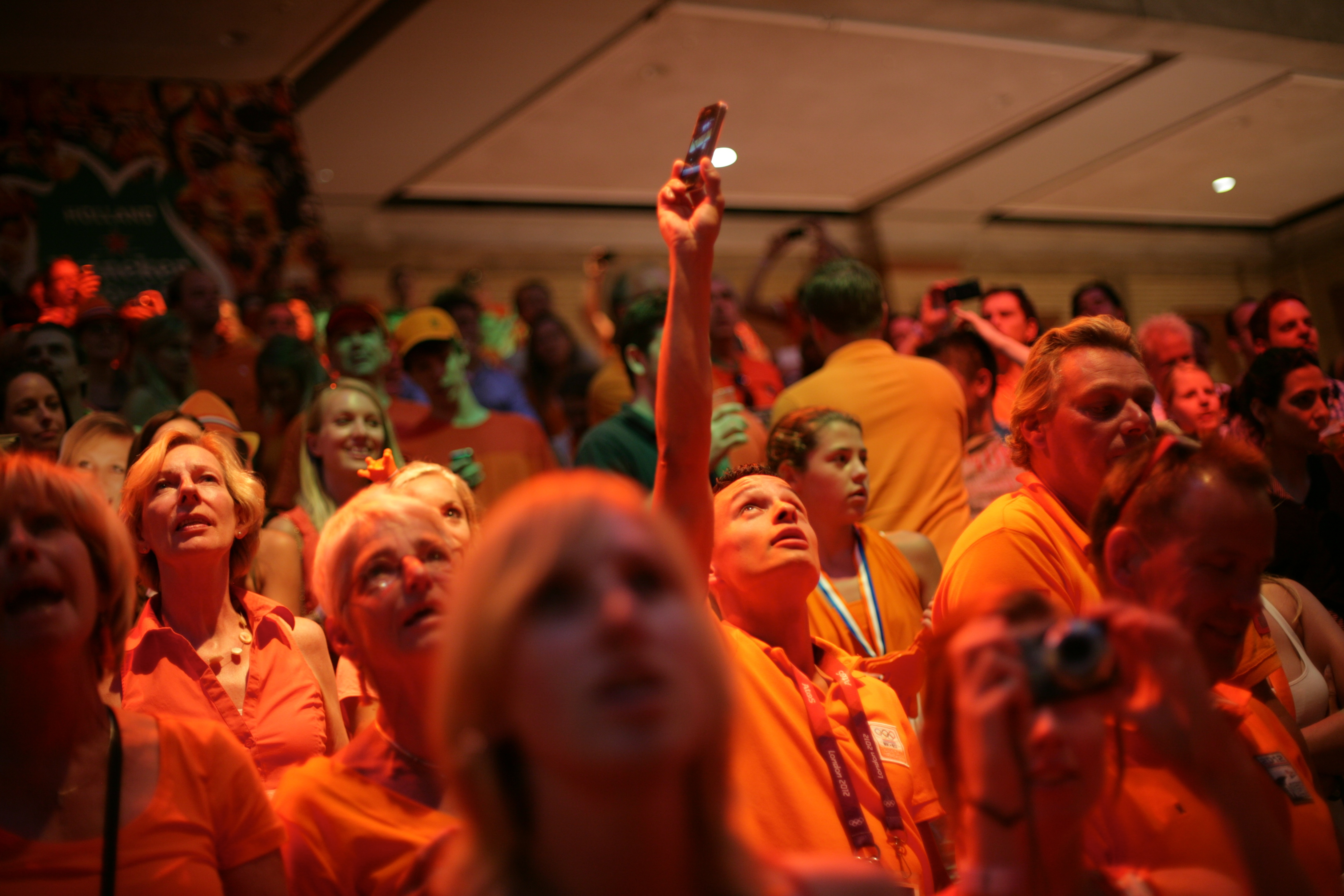 Holland Heineken House